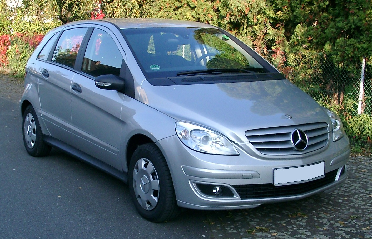 Mercedes-Benz B-Klasse